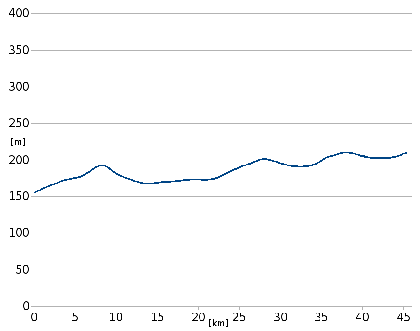 Výškový profil železniční trati 114 Lovosice - Postoloprty